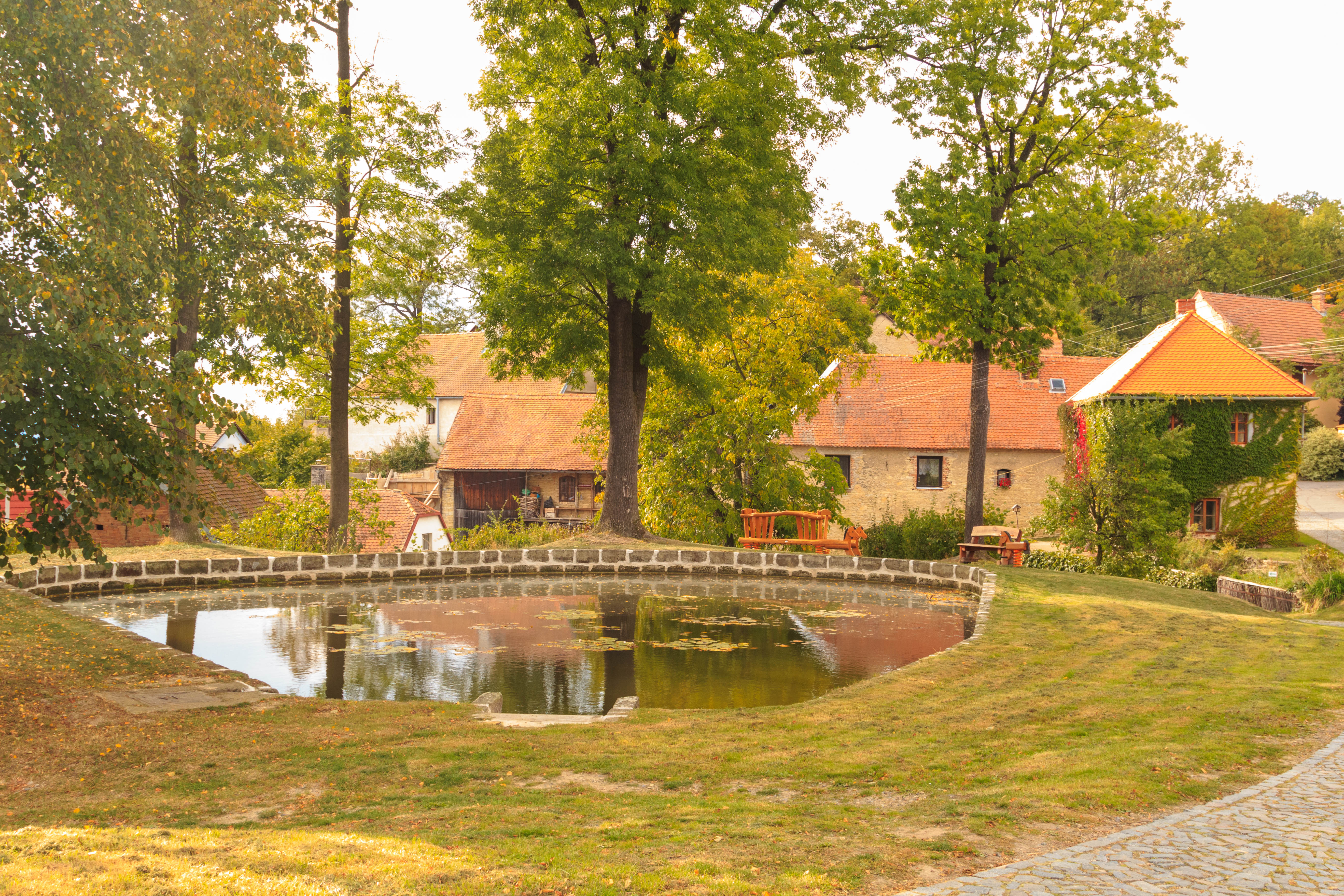 Mravín náves